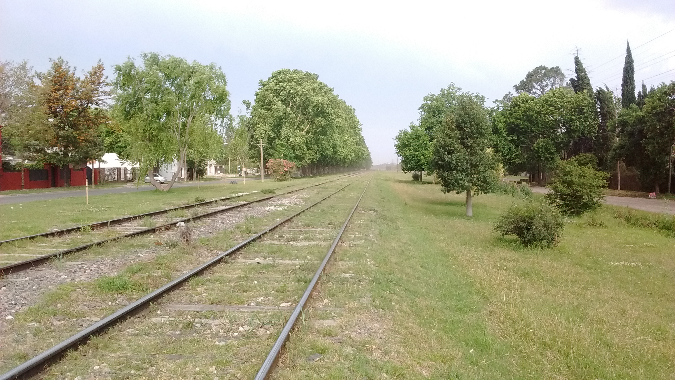 Vista verde del tramo férreo en la ciudad de Funes.